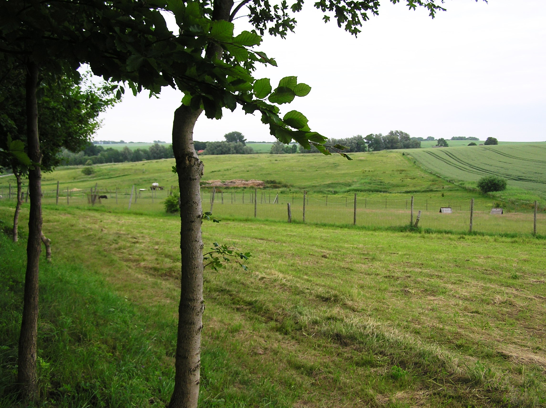 hügelige Graslandschaft